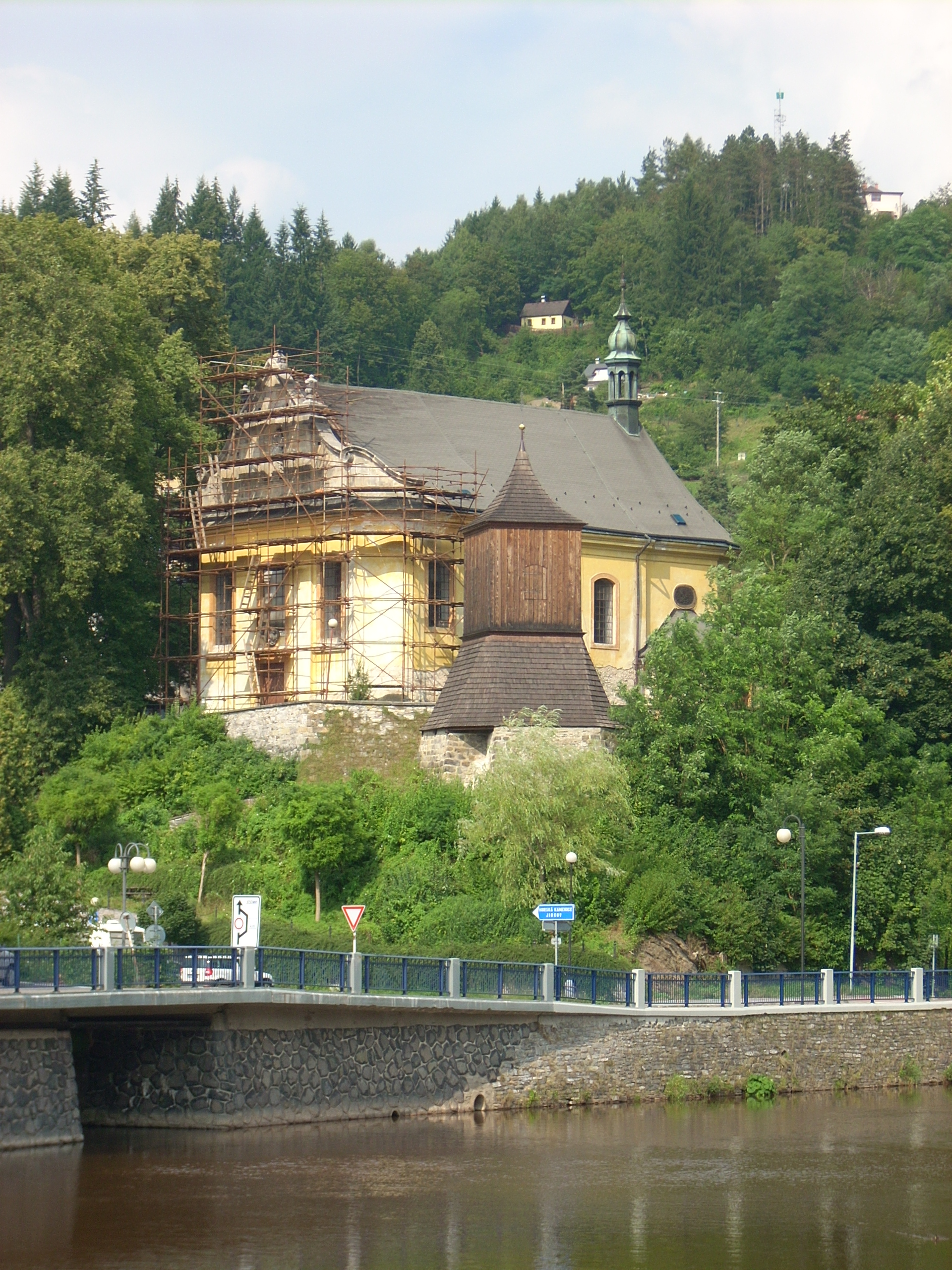 Kostel sv. Jakuba Většího s farou (Železný Brod), Trávníky - Malý rynek, Železný Brod